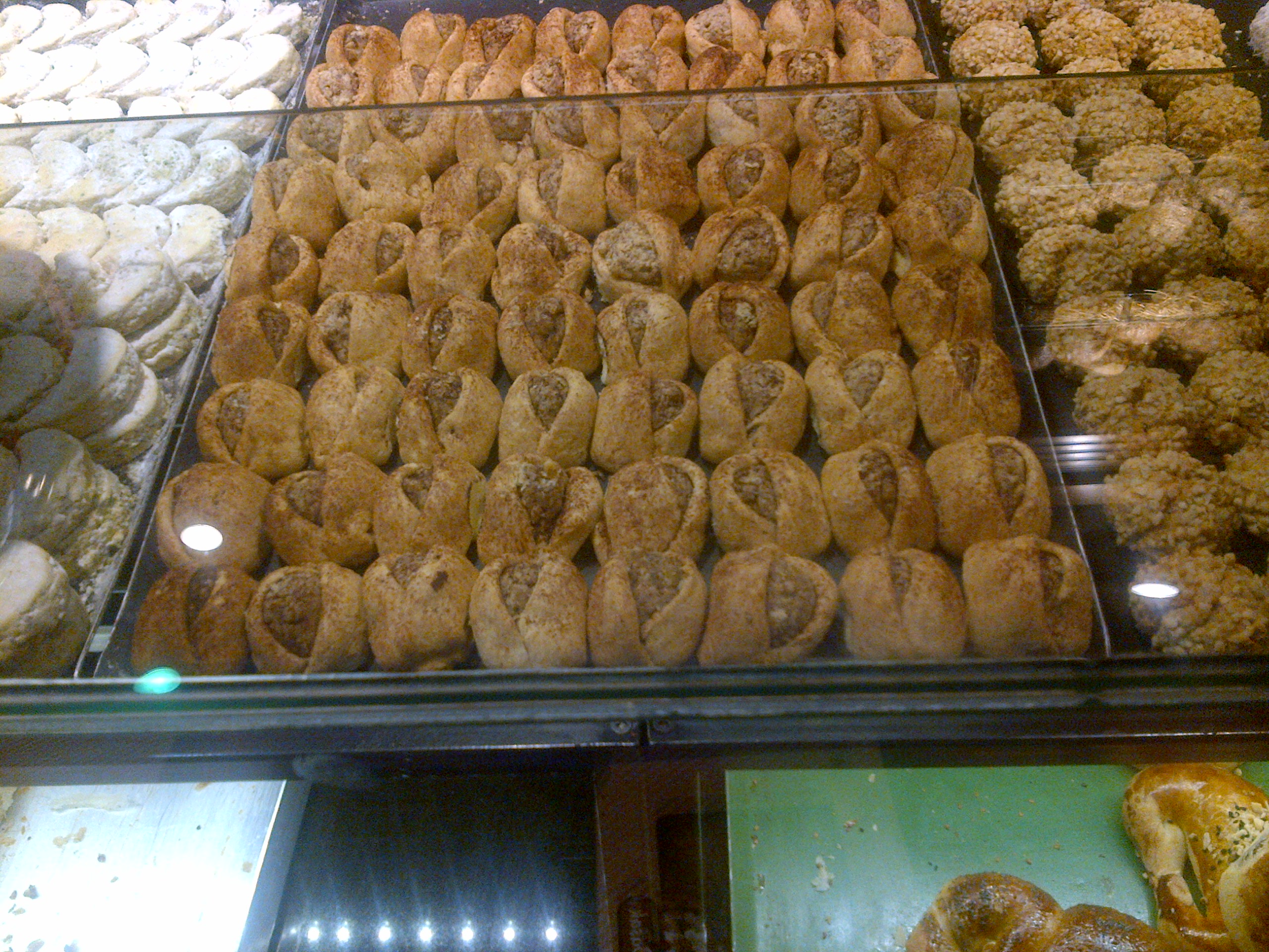 Variedades de "kurabiye" en una panaderia de Turquia. Los del centro son "Tahinli-cevizli", o sea con tahina y nueces.